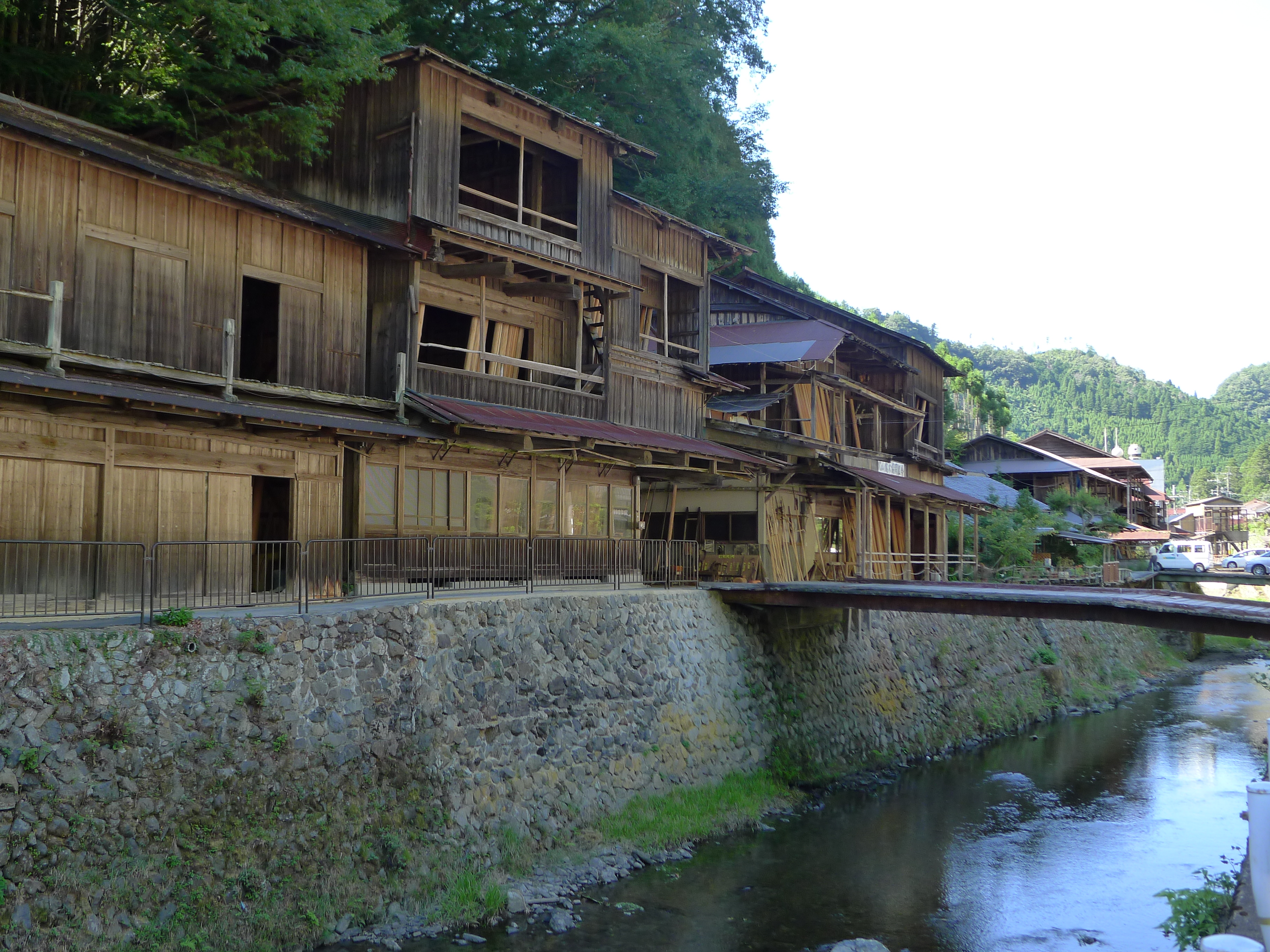 京都市北区北山「杉の里」中川地区の木造倉庫